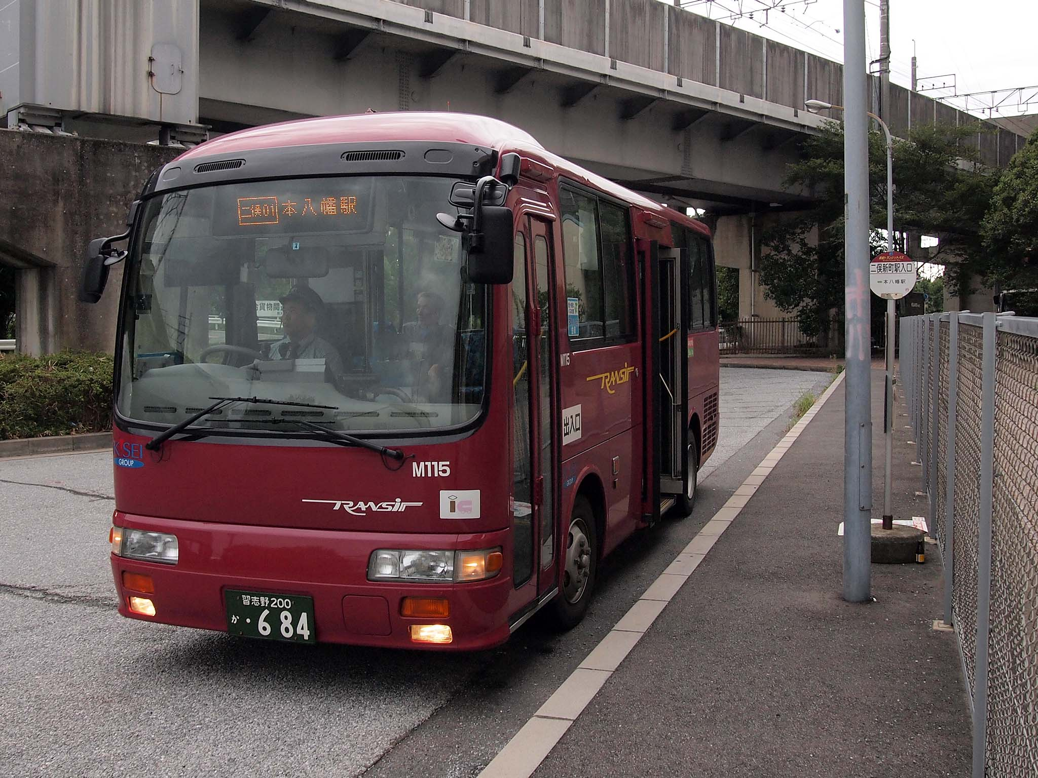 二俣新町駅入口停留所で出発を待つ京成トランジットバス原木線・二俣01系統。原木中山駅の前後が大型車通行止め区間のため、主にステップリフト付きの日野・リエッセで運行される。奥の高架は武蔵野線と京葉線の東京方面を結ぶ高谷支線。 型式：PB-RX6JFAA 登録番号：習志野200か・684